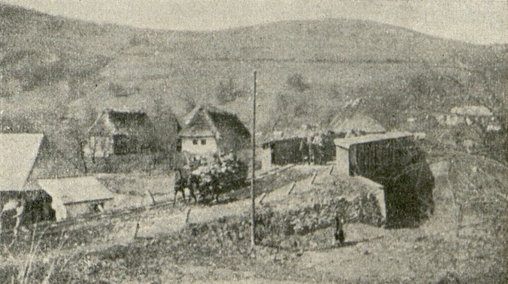 Die Feldbahn bei Nagypolány